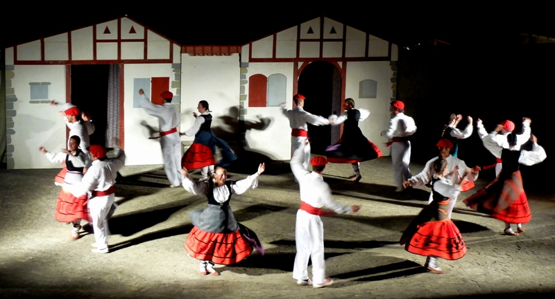 Danses Basques du groupe folklorique Xinkako à Bidart